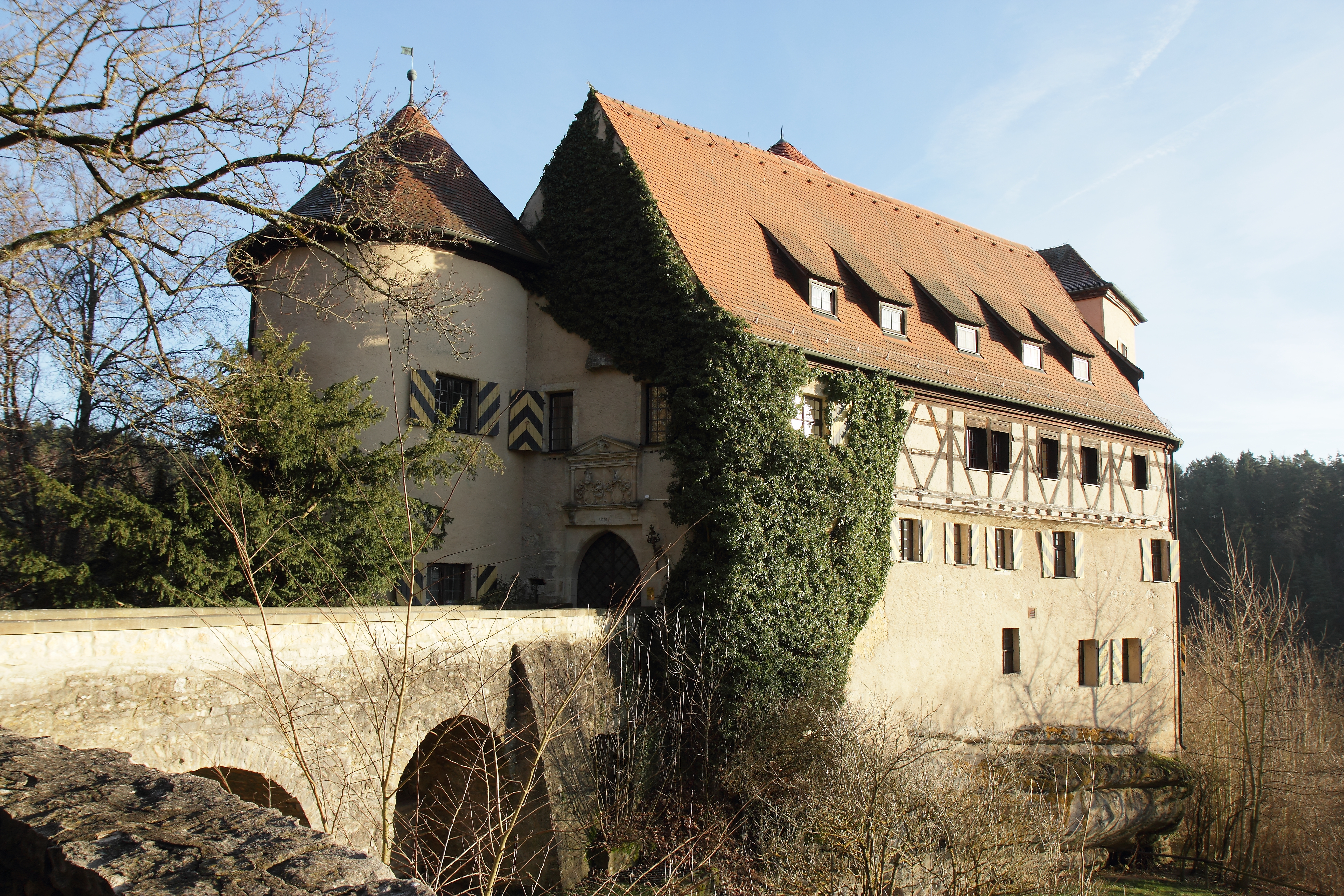 Burg Rabenstein - Ansicht aus nordwestlicher Richtung